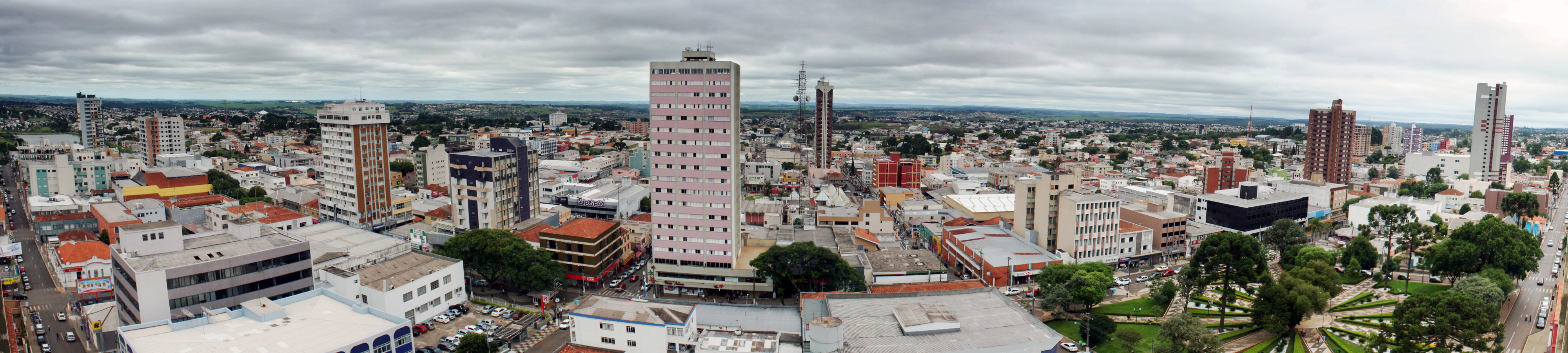 Foto panorâmica gerada a partir de cinco fotos individuais, tiradas no dia 26 de janeiro de 2012, a partir do Edifício Samuara, em Guarapuava. É possível ver a Praça 9 de Dezembro, a rua XV de Novembro, o Hotel Atalaia, o prédio da Rádio Cultura, o Parque do Lago, a rodoviária (longe, ao fundo), o Hospital Santa Tereza, e partes de alguns bairros.